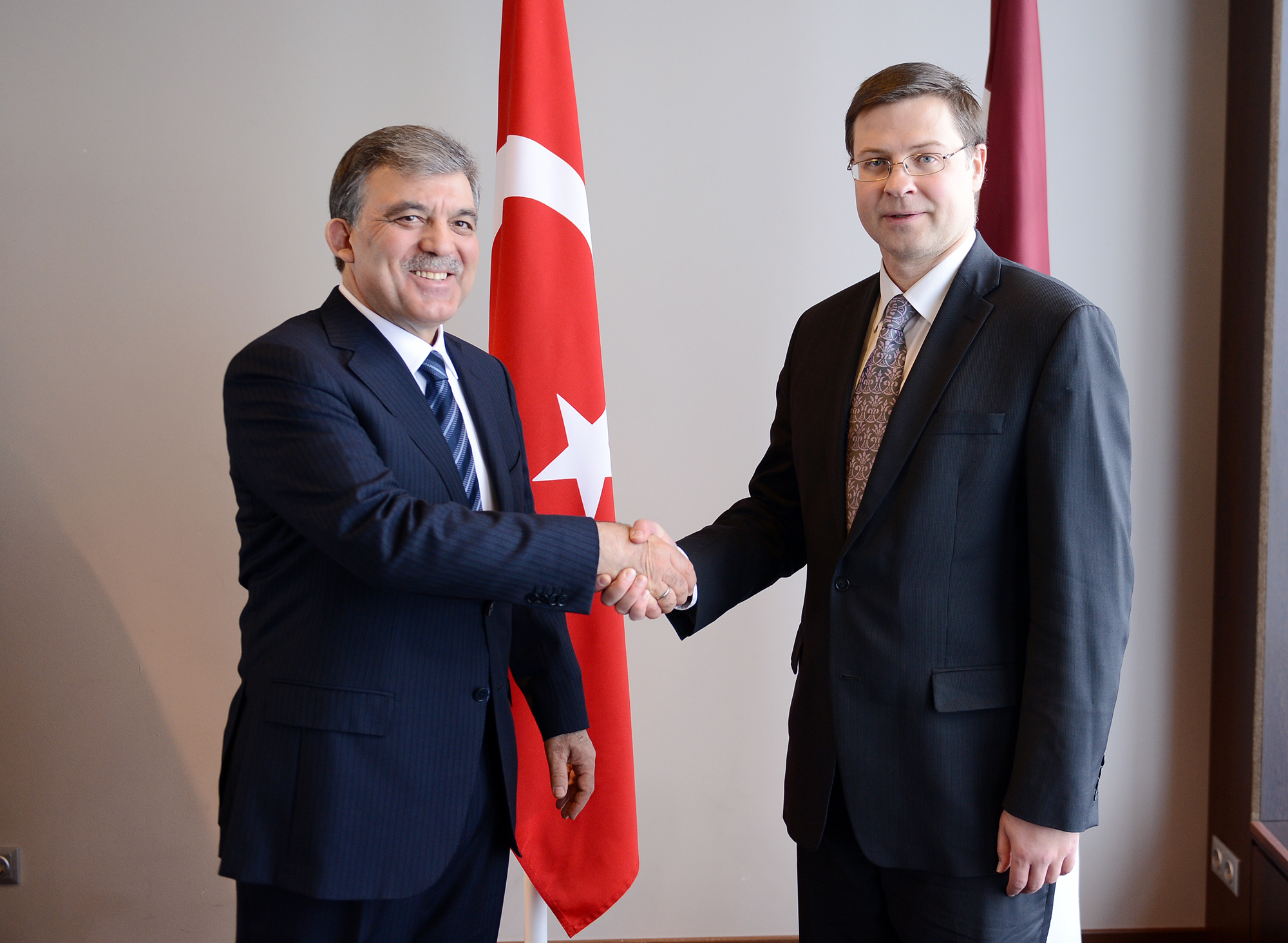 Ministru prezidents Valdis Dombrovskis tiekas ar Turcijas prezidentu Abdulu Gilu